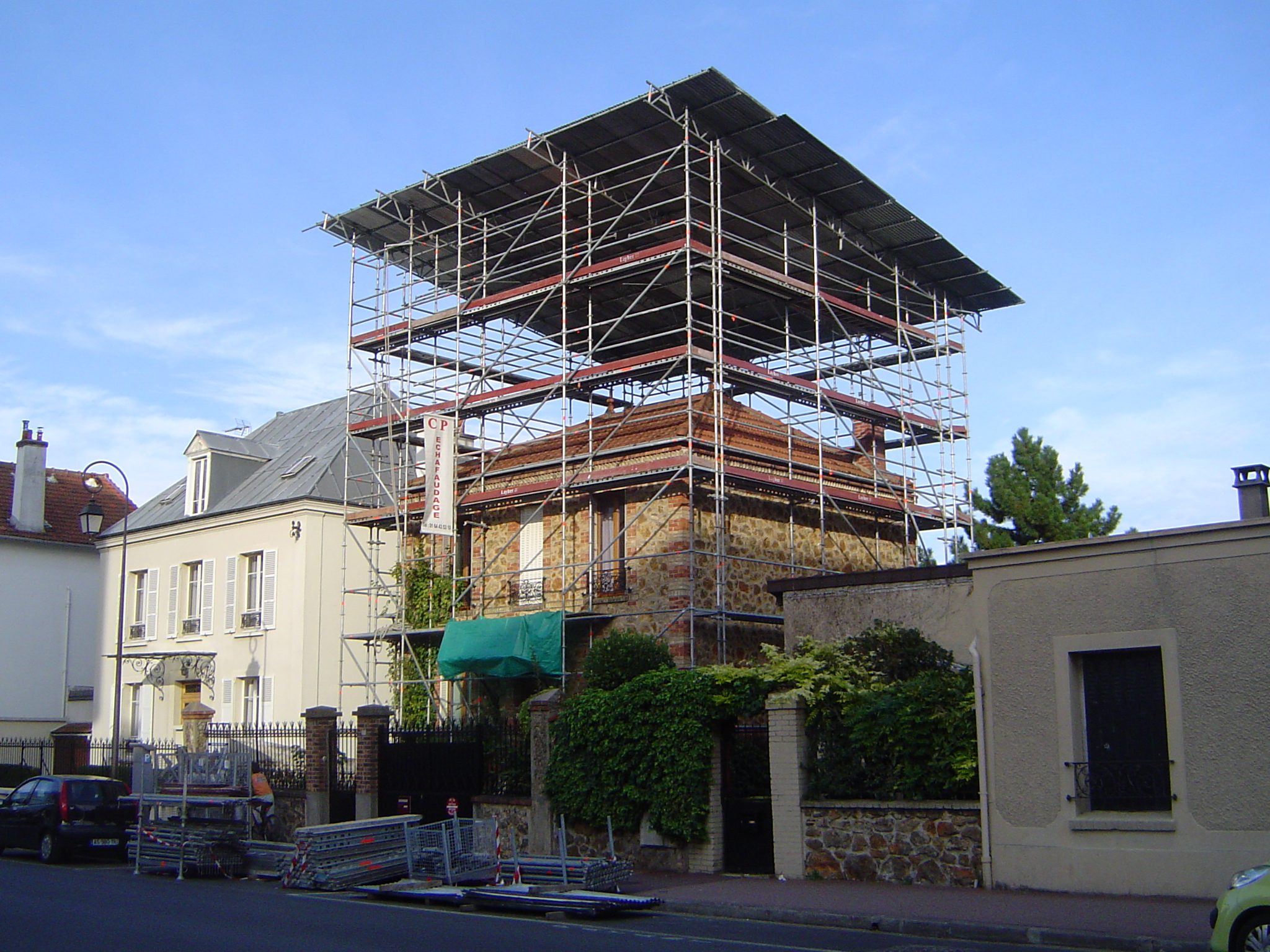 Photo prise à Antony (France)